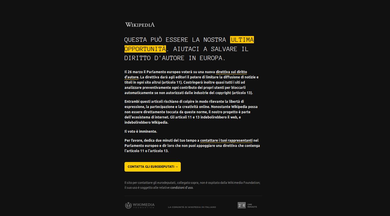 Banner dell'oscuramento di Wikipedia in italiano realizzato il 25 marzo 2019, giorno precedente al voto in Parlamento europeo della Direttiva copyright